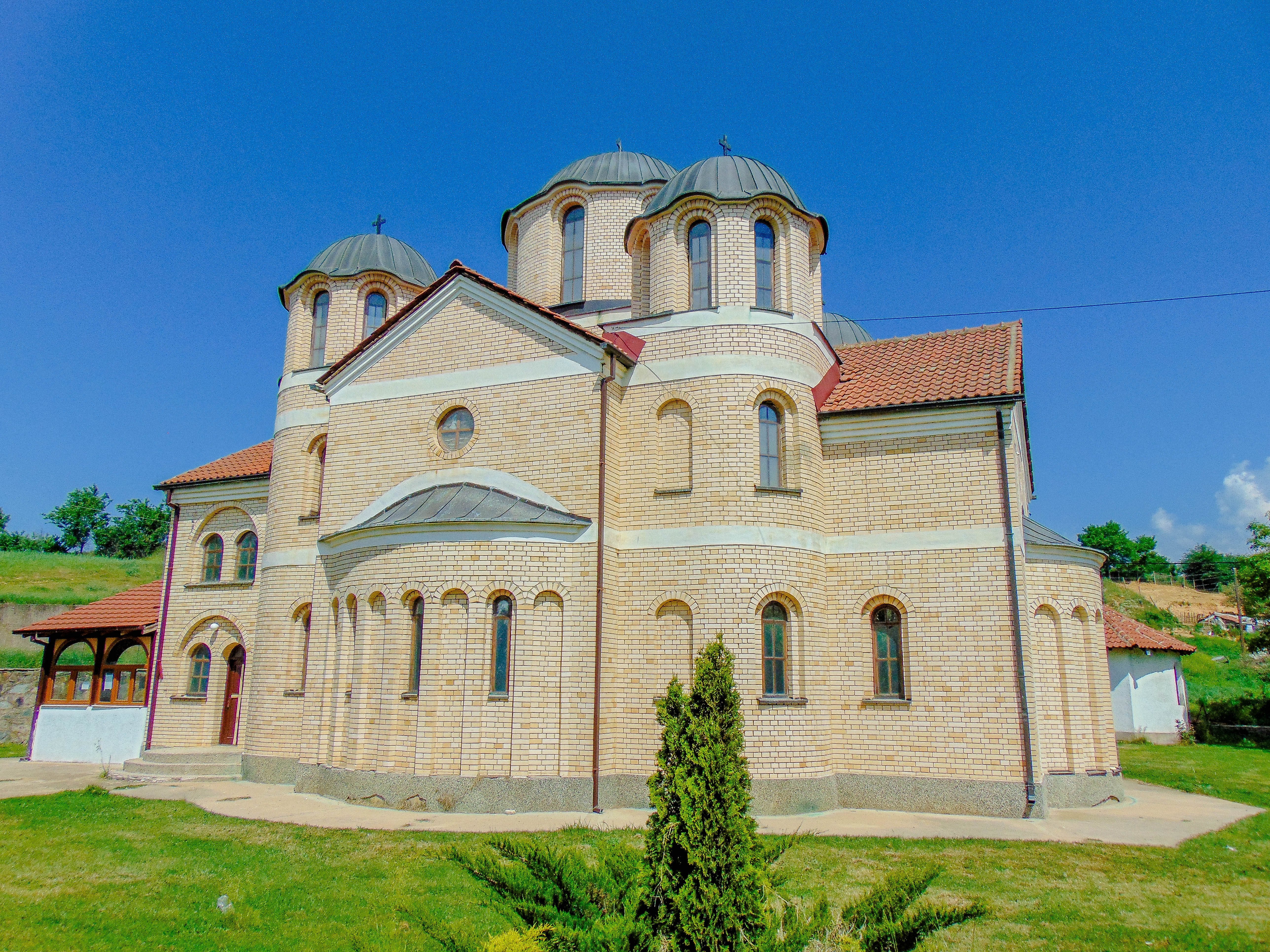 Црква „Св. Атанасиј“ - Ораовица